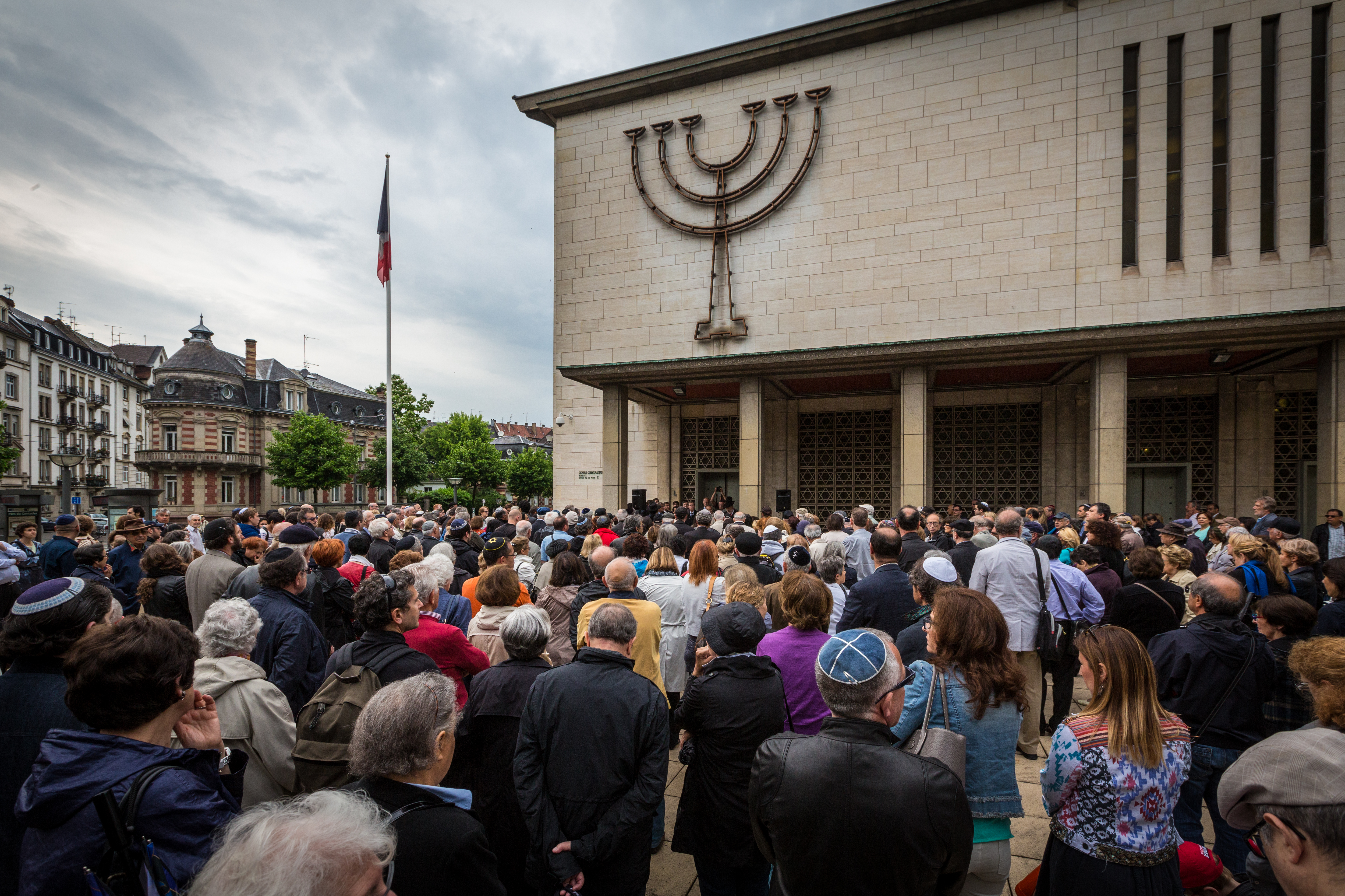 Strasbourg, 26 mai 2014 à la synagogue de la Paix. Un assemblement silencieux suite à l’attentat Bruxelles du 24 mai réunit 400 personnes.